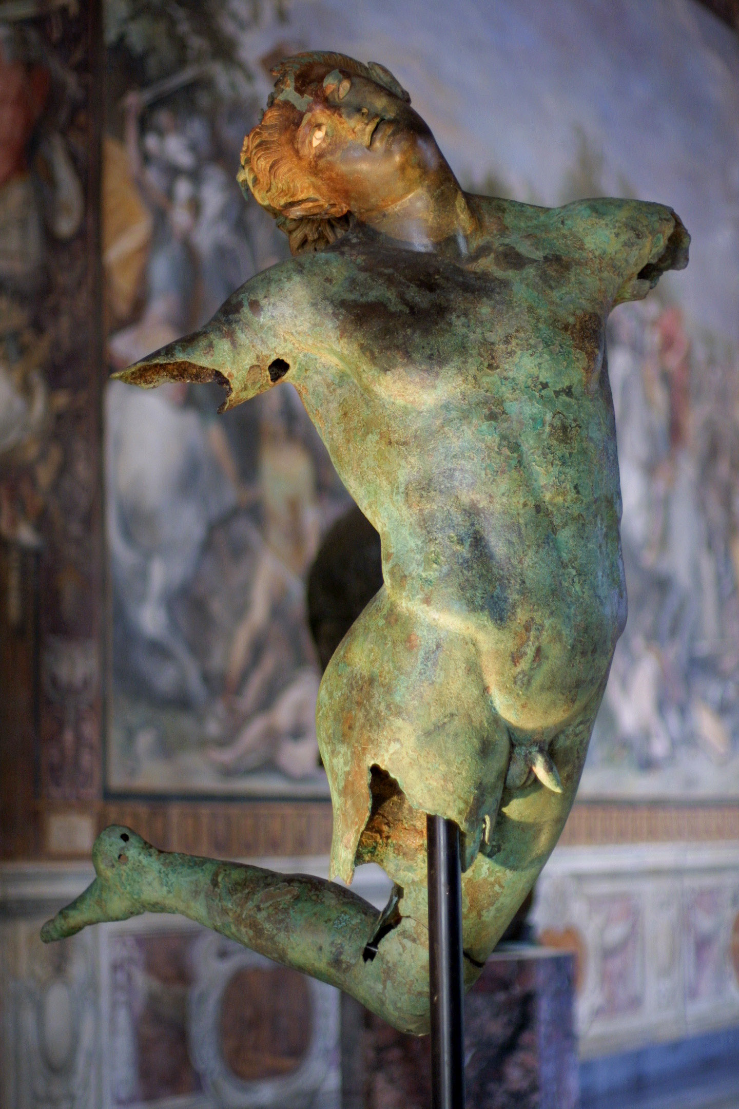 satiro danzante nella mostra nei musei capitolini 2003